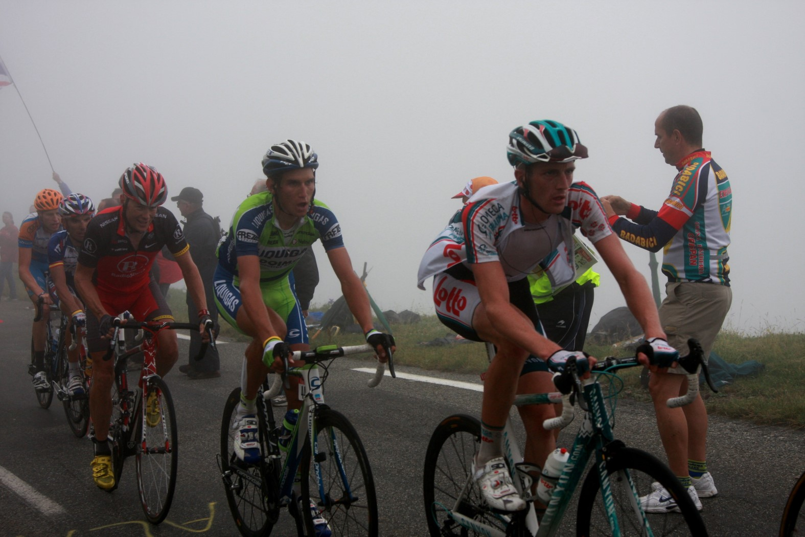 6068 jurgen en co